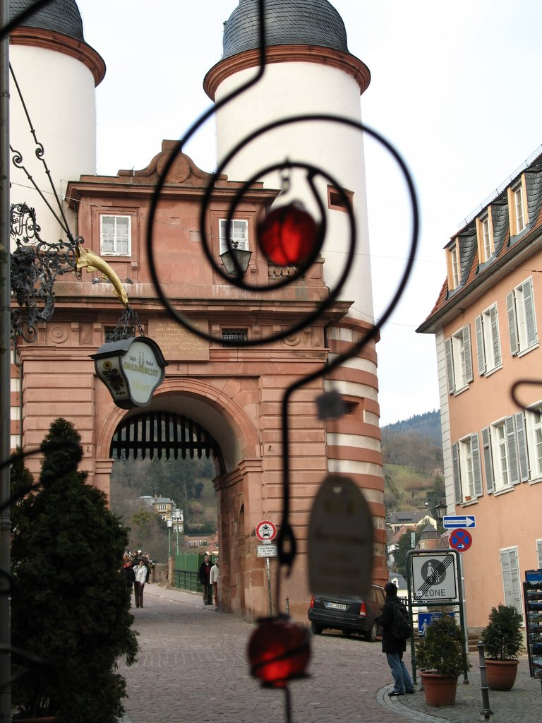 Author: Przemyslaw "Tukan" Grudnik